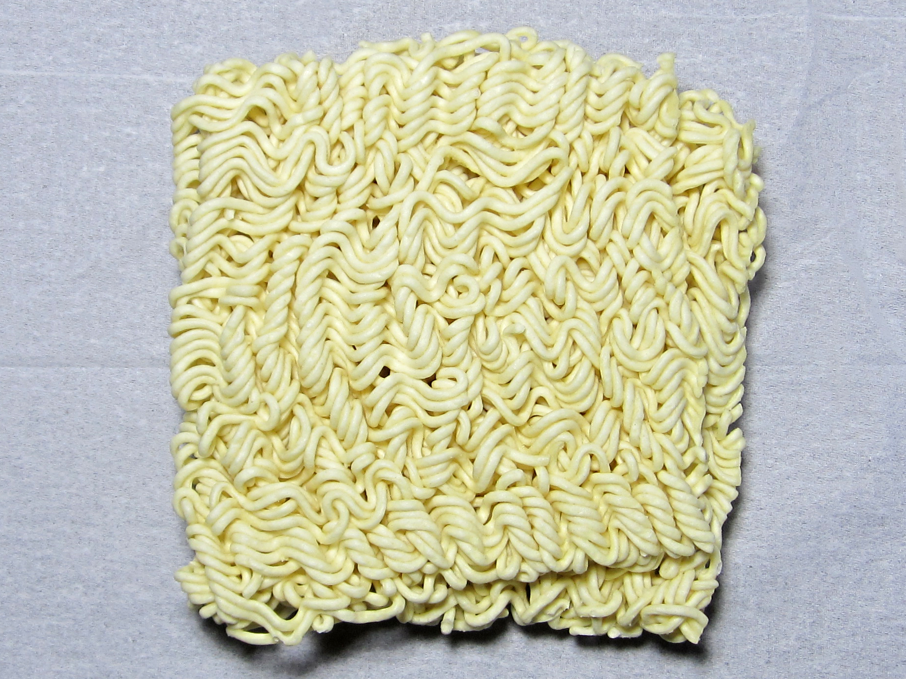 典型的な袋タイプインスタントラーメン